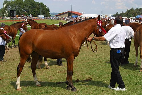 Marché-Concours 2004: Zuchtpferde am Umzug